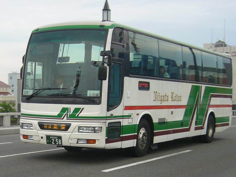 新潟200か・258。新潟交通所属東京～新潟線用。万代橋にて撮影。